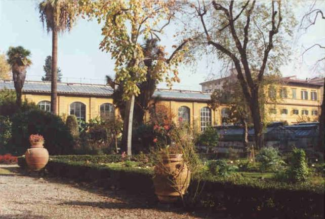 Serre e edificio centrale del Giardino dei Semplici di Firenze